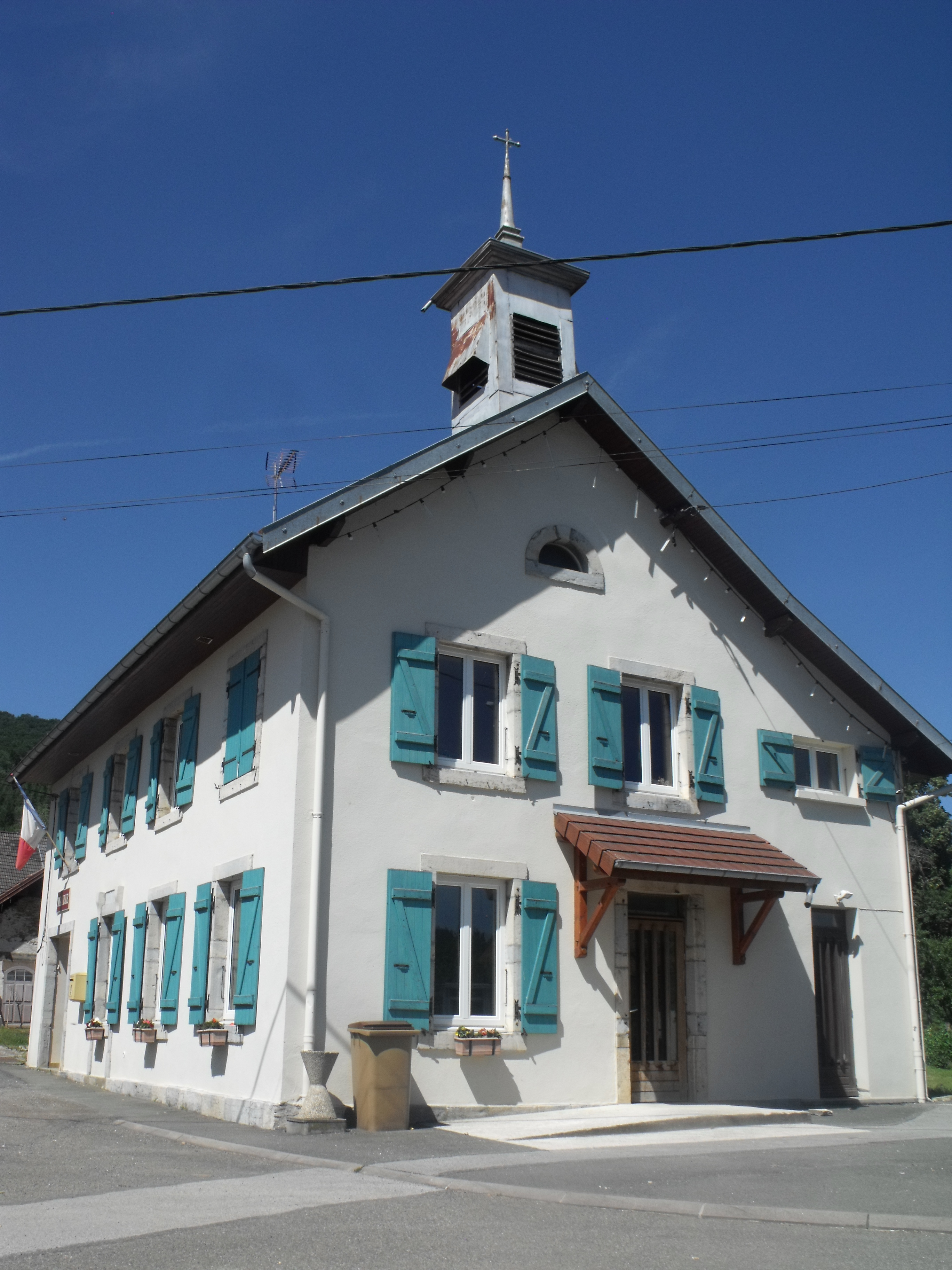 Mairie de Feule, Doubs, France